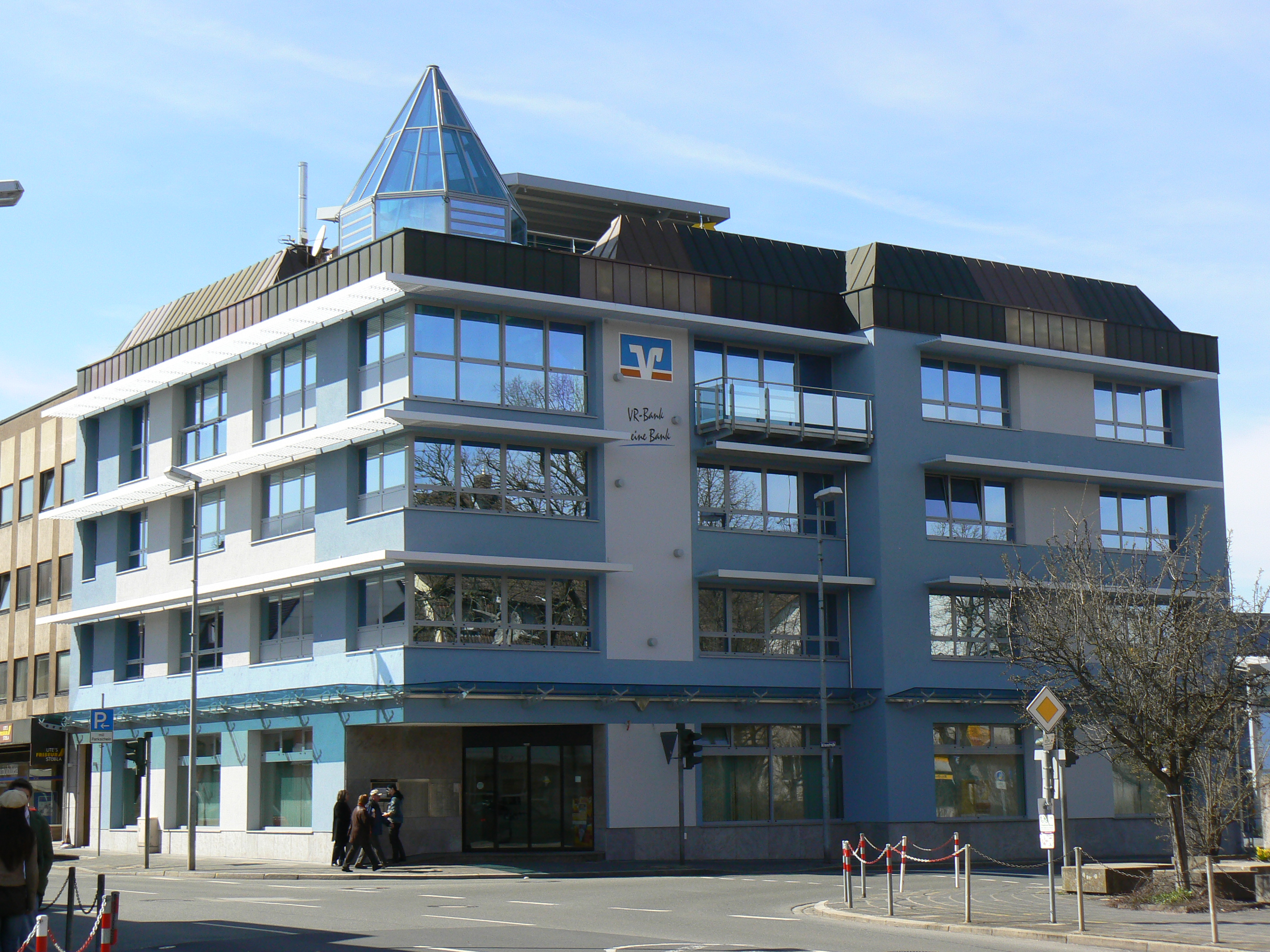 VR-Bank Uffenheim-Neustadt eG